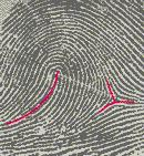 Daktiloskopia - Radial